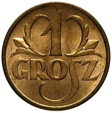 1 grosz front